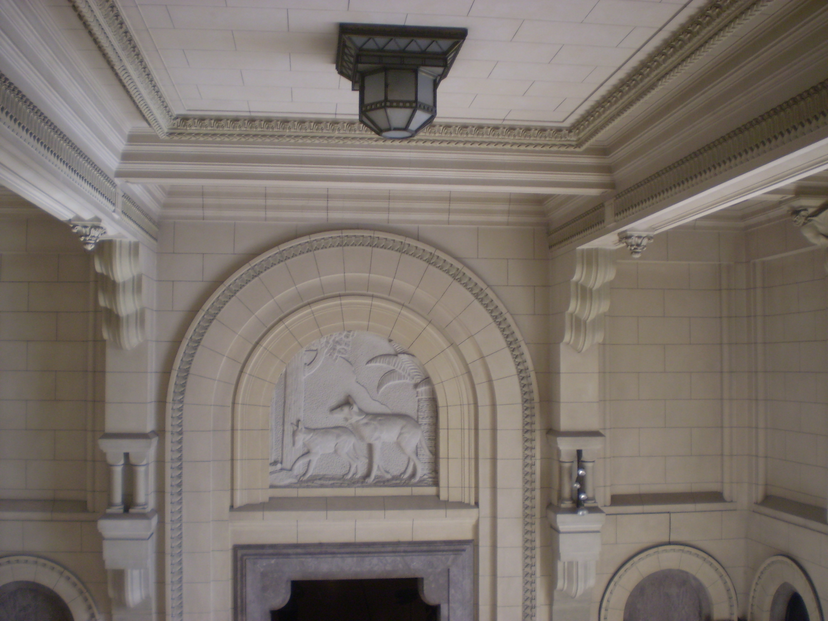 Museo Argentino de Ciencias Naturales "Bernardino Rivadavia", detalles de la arquitectura del edificio